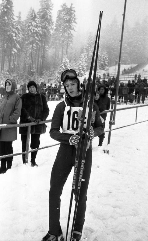 Jens Weißflog ADN-ZB/Schaar/6.1.83/Österreich: Vierschanzen-Tournee Jens Weißflog (DDR/Foto vom FDGB-Pokalsprunglauf am 26.12.82 in Oberhof) feierte zum Abschluß der 32. Internationalen Vierschanzen-Tournee in Bischofshofen einen glänzenden Erfolg. Der 18jährige Oberwiesenthaler holte sich mit Sprüngen von 109,5 und 110m und der Gesamtnote 257,2 den Tagessieg und rückte damit in der Tournee-Gesamtwertung auf den zweiten Rang hinter dem siegreichen finnischen Weltmeister Matti Nykänen. Abgebildete Personen: Weißflog, Jens: Skisportler, Sprunglauf, SC Traktor Oberwiesenthal, Olympiade 1984, Vaterländischer Verdienstorden (VVO) in Gold 1984, DDR